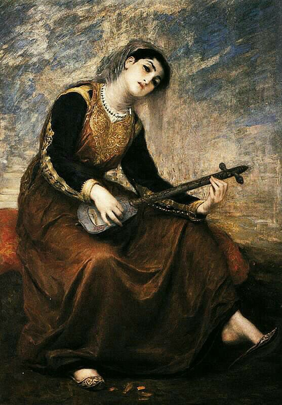 Joueuse de derbouka, Algérie